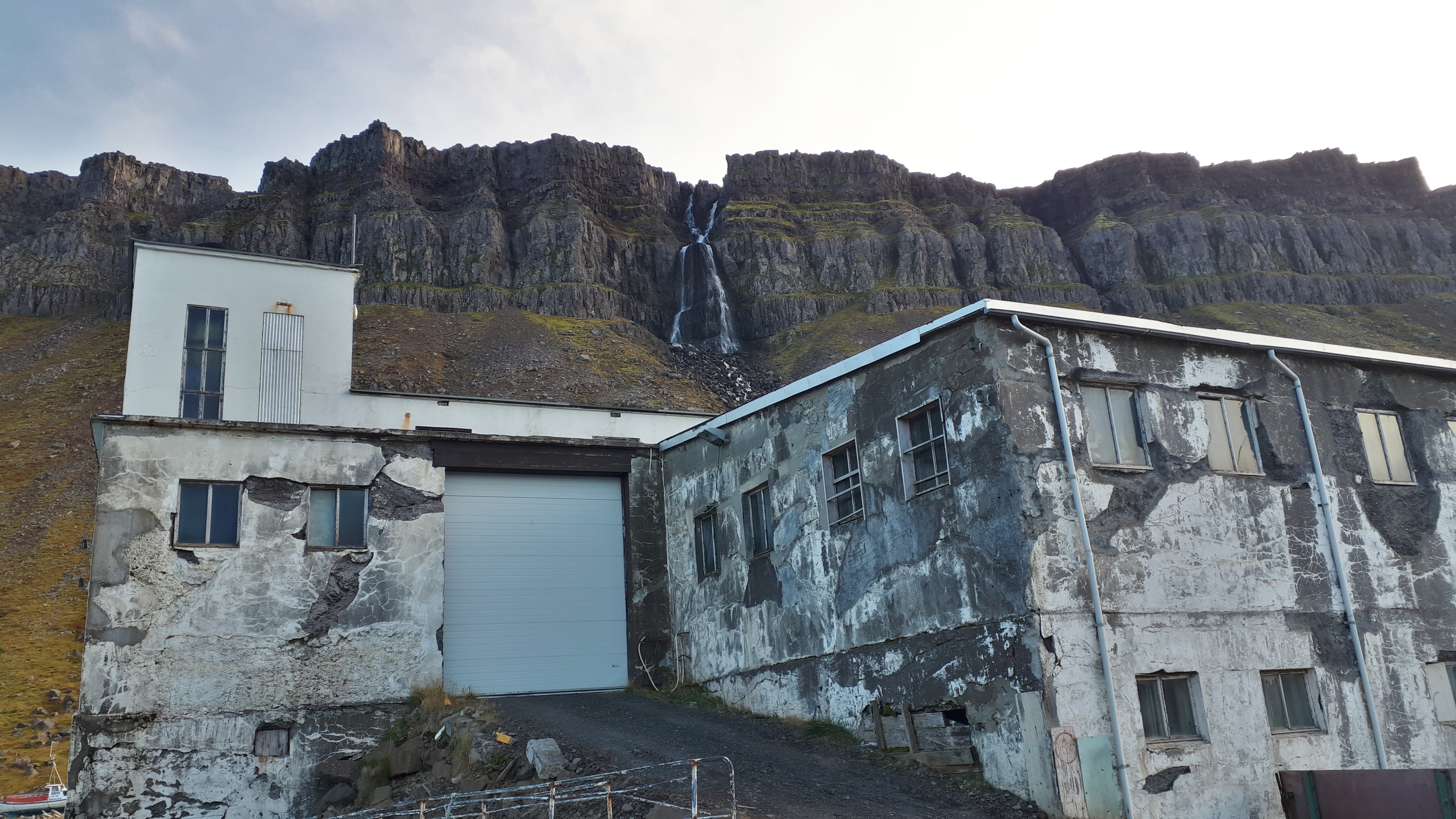 Djúpavík old fish factory in Iceland.